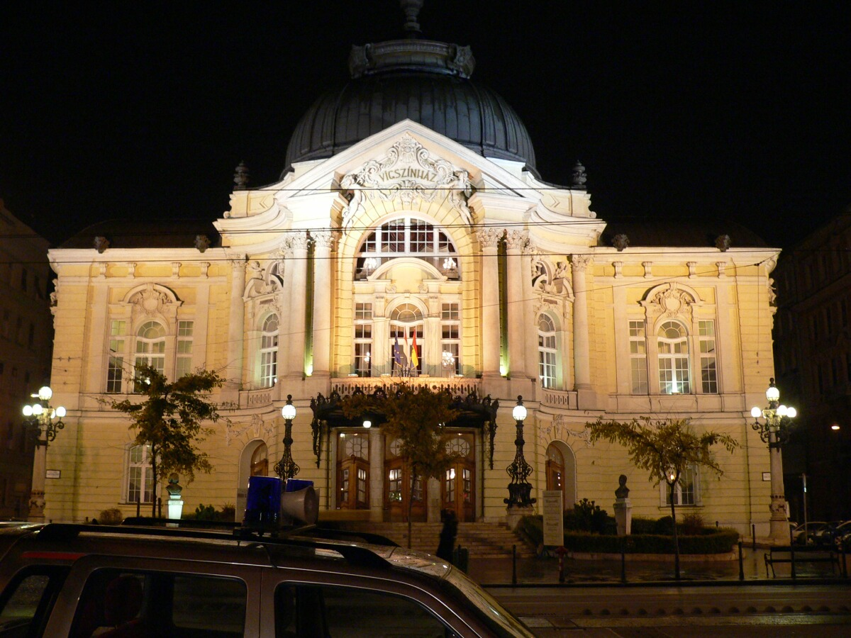 A Vígszínház épülete 'Szent István körút páros oldala a Jászai Mari tértől a Nyugati térig' épúletegyüttes részeként műemlék. Azonosító: -8361. Az épületszobrok elkészítői: Ferdinand Fellner (építész), Hermann Helmer (építész), Kiss Tibor (építész) 1951. - Budapest, XIII. kerület, Újlipótváros, Szent István körút This is a photo of a monument in Hungary, Identifier: -8361 Object location47° 30′ 45.12″ N, 19° 03′ 05.03″ E